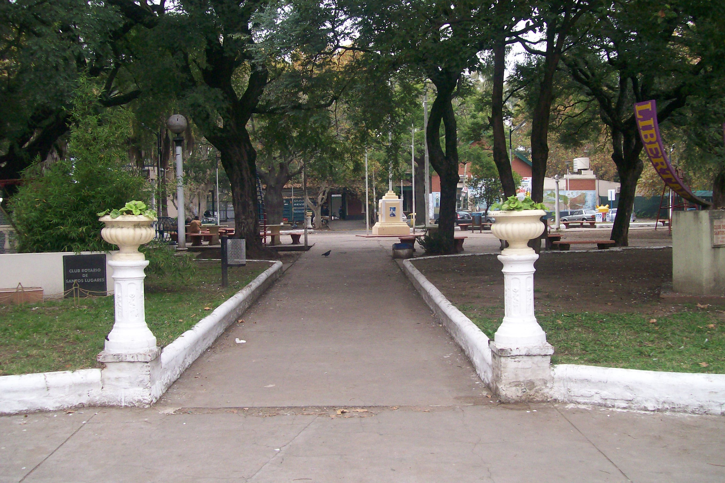 Un acceso a la plaza Arturo Illia de Santos Lugares